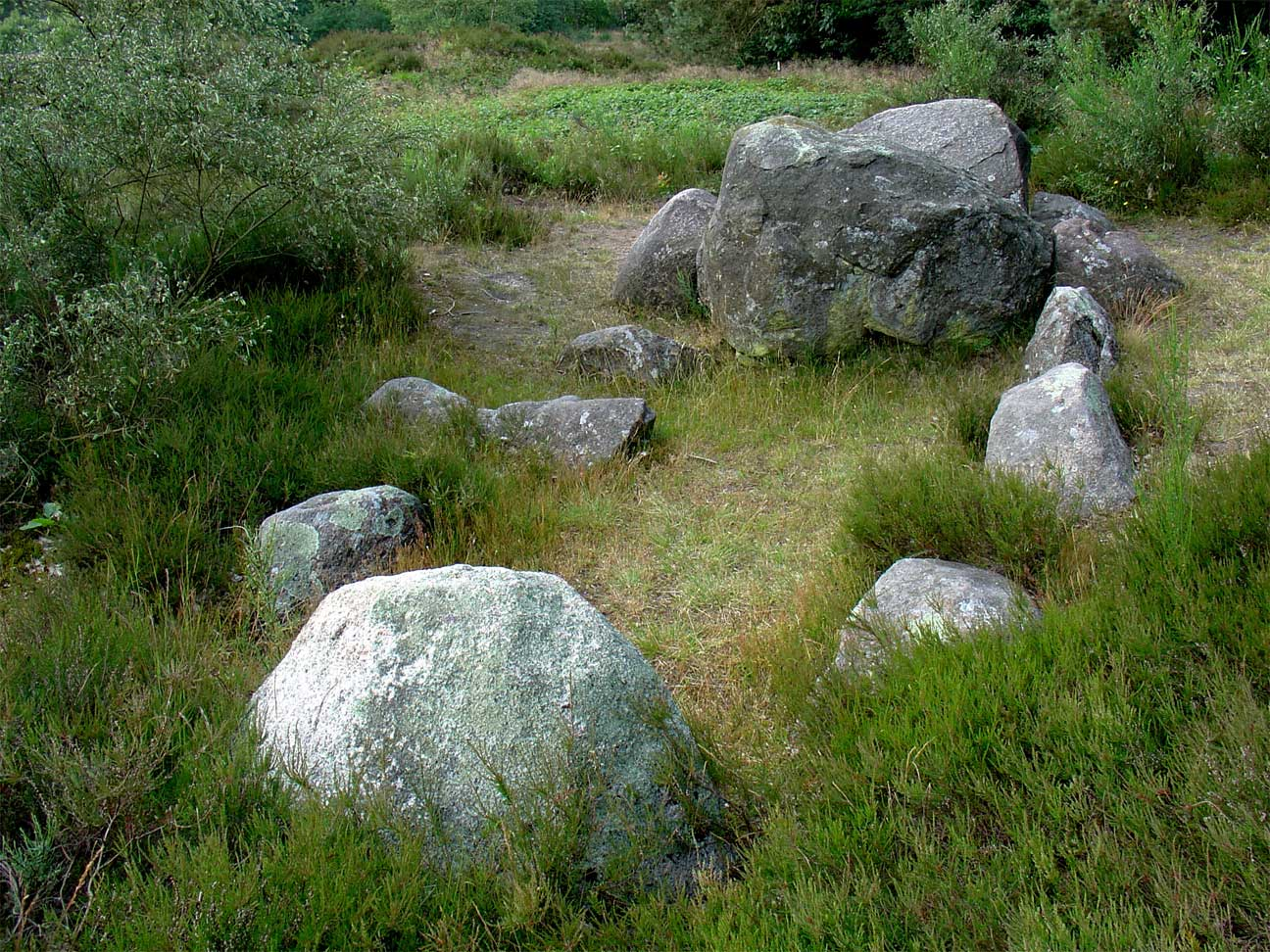 Hunebed D38 in het Valtherbosch bij Emmen